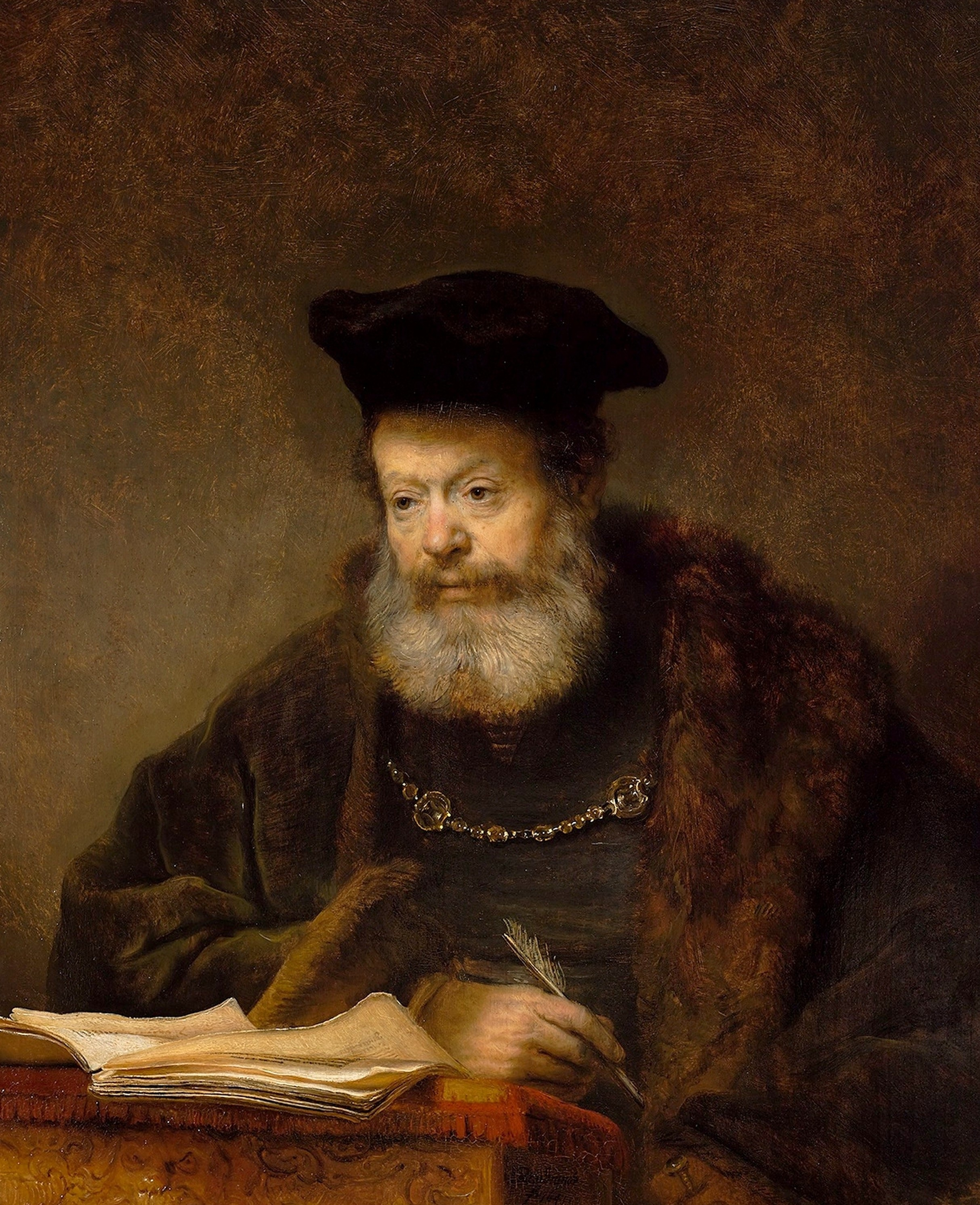 Scholar at his Writing Table. Pendant of File:Rembrandt Harmensz. van Rijn 159.jpg